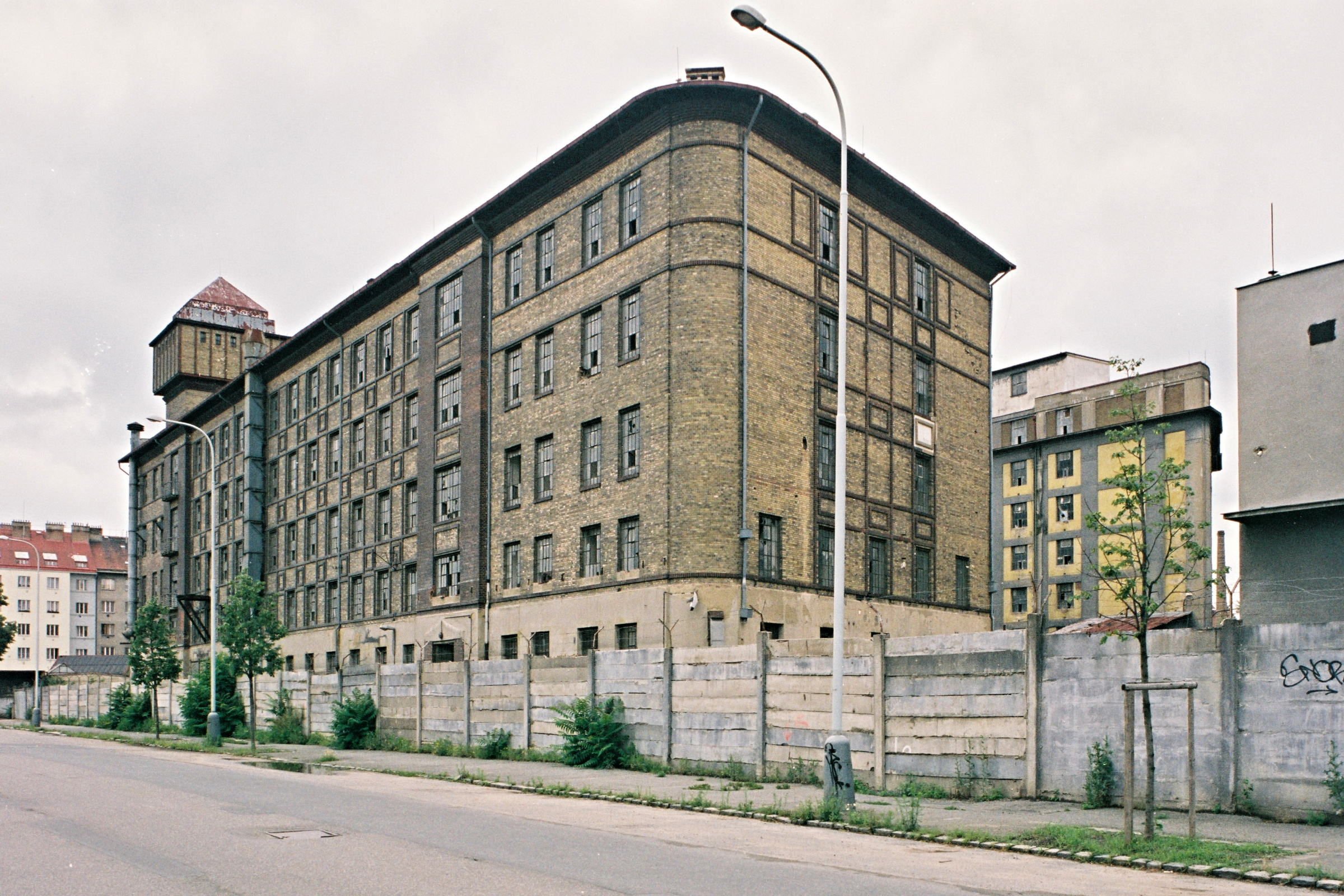 Akciový parní mlýn v Holešovicích, U Uranie, Na Maninách 1037/56, Jankovcova 1037/49, U parního mlýna 1037/1, pohled od severu.